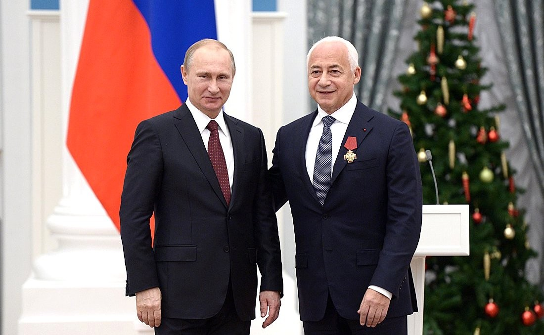 Награждение Владимира Спивакова Орденом «За заслуги перед Отечеством» IV степени. Церемония вручения государственных наград Российской Федерации. 22 декабря 2014 года